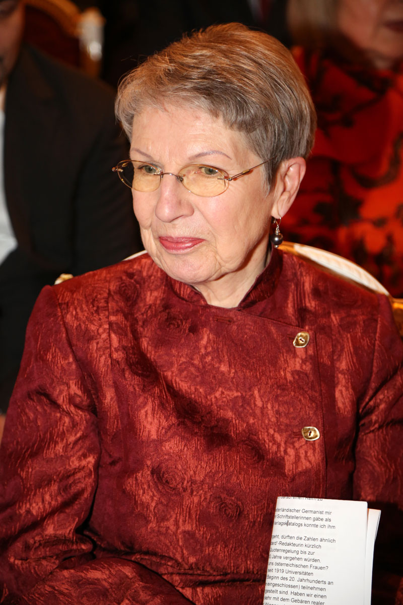 Barbara Frischmuth-2820